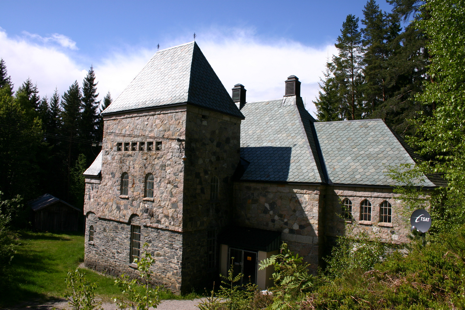 Langerak kraftstasjon, Bygland